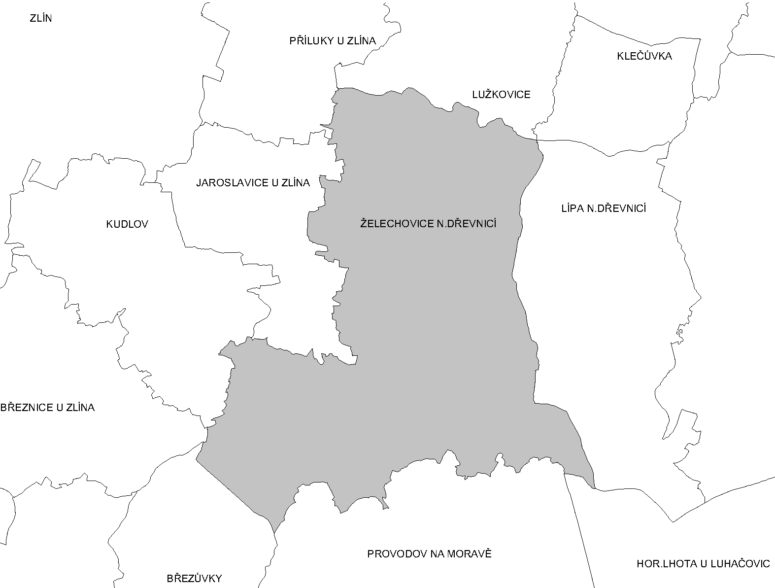 Katastr Želechovic n/D